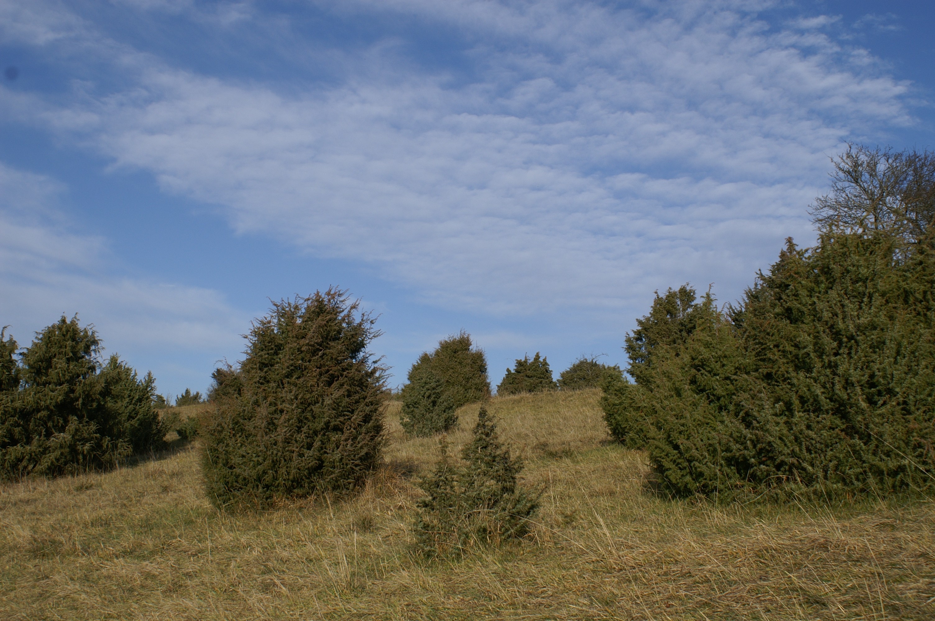 Das Gebiet Mönchsteig mit den Wacholderheiden bei Aichen steht seit 1991 unter Naturschutz.